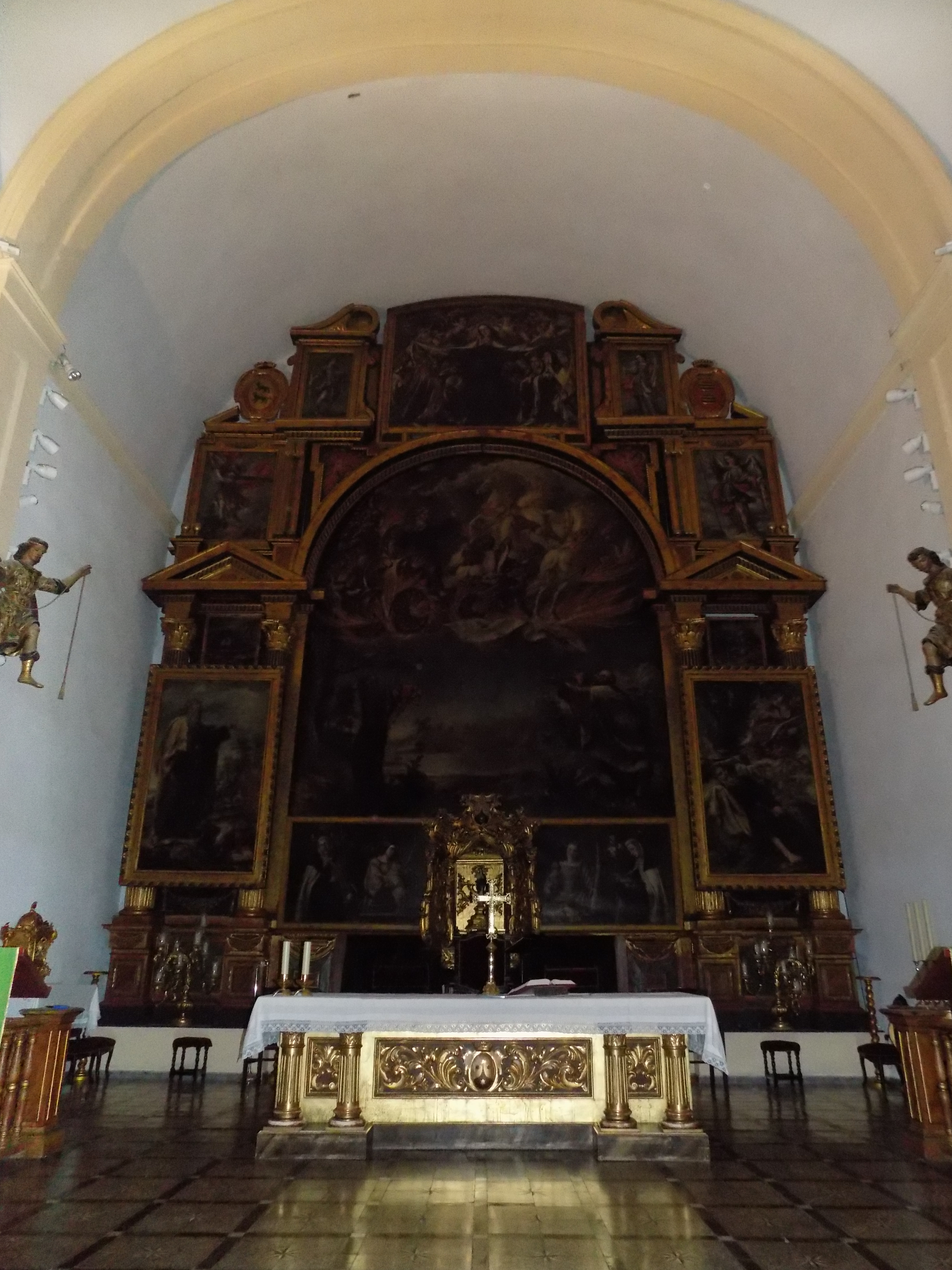 Retablo mayor de la iglesia de Nuestra Señora del Carmen de Córdoba, (España).